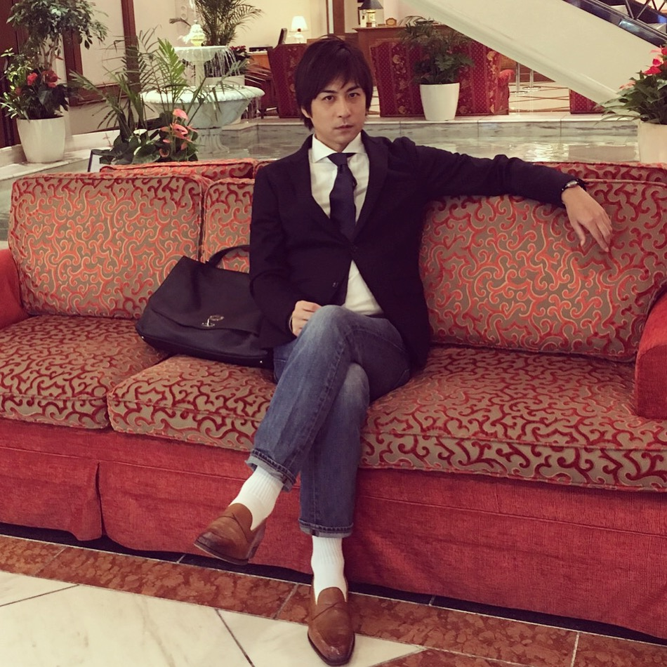 2017年10月、京大俳句会ホテル日航プリンセスにて